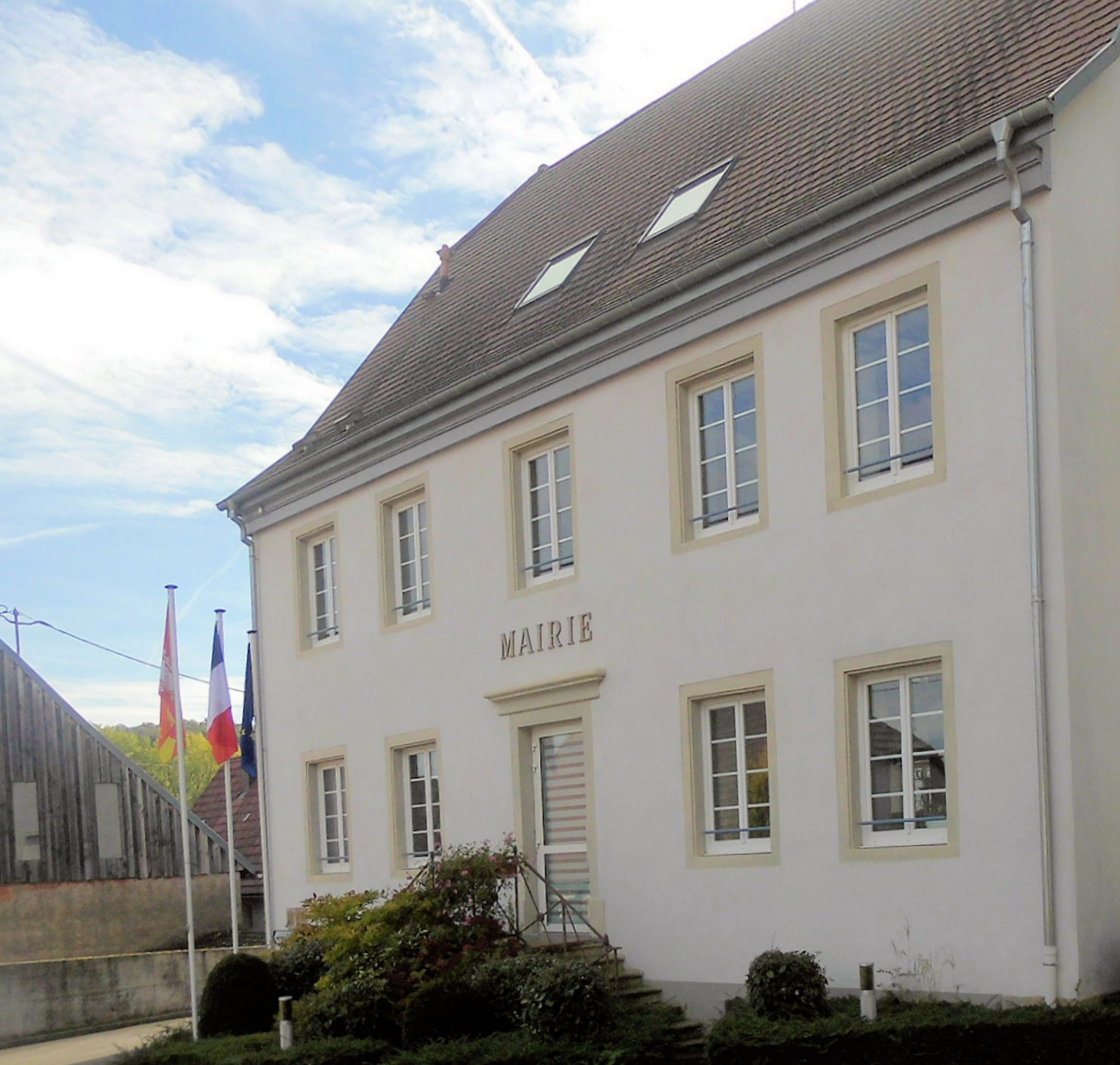 La mairie de Walheim